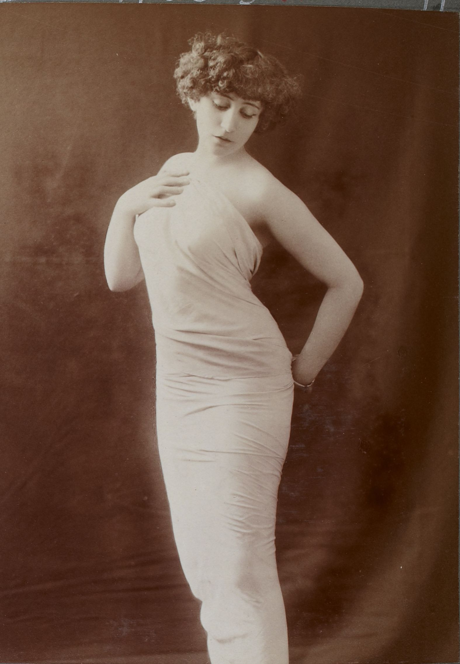 Колетт в начале 1900-х годов